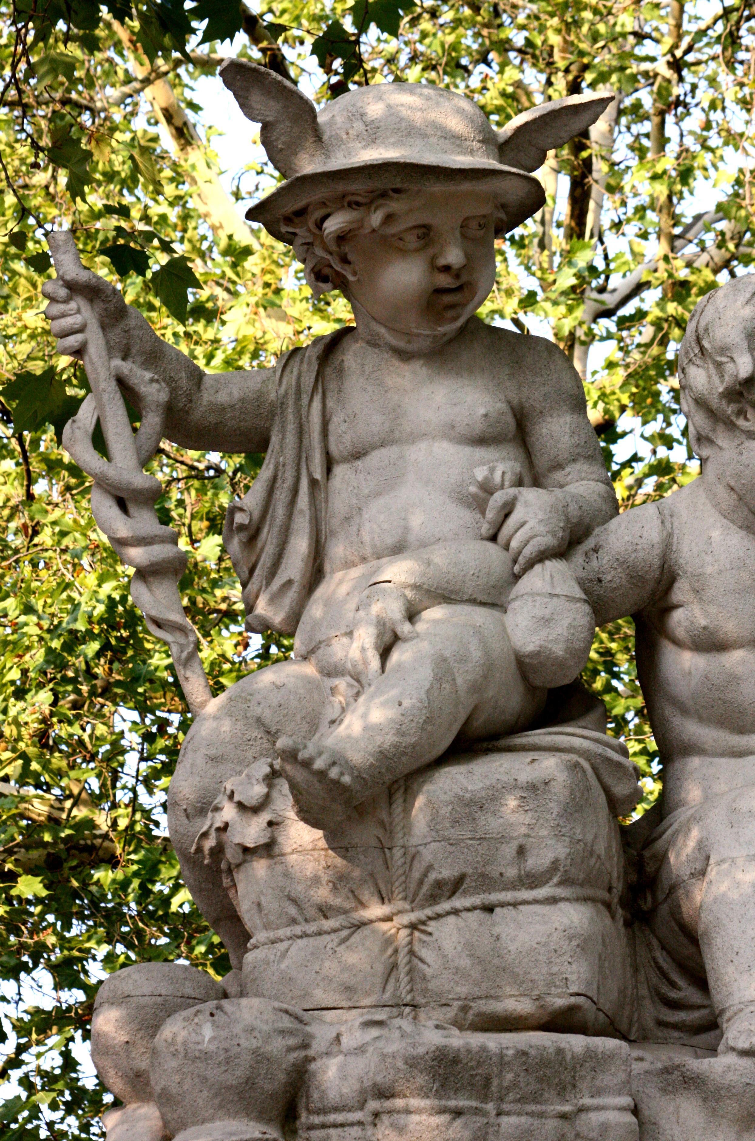 Parc de Bruxelles, allée dans l'axe de la rue de la Montagne. Groupe symbolisant le Commerce de Godecharle. Détail : enfant symbolisant le commerce, coiffant le casque de Mercure et tenant en main le caducée